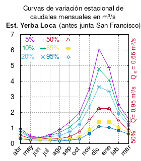 Curavs de variación estacional del estero Yerba Loca antes de junta con el río San Francisco. # cita publicación #| apellido = Dirección General de Aguas #| nombre = #| enlace-autor = Ministerio de Obras Públicas (Chile) #| título = Diagnóstico y clasificación de los cursos y cuerpos de agua según objetivos de calidad. Cuenca del río Maipo #| ubicación = Santiago de Chile #| editorial = Ministerio de Obras Públicas (Chile) #| año = 2004 #| edición = #| url = #| urlarchivo = #| fechaarchivo = #| ref = harv # Tabla 4.10: Estación Yerba Loca antes de junta con San Francisco pág.62 mes 5% 10% 20% 50% 85% 95% abr 0.97 0.85 0.74 0.56 0.40 0.33 may 0.48 0.43 0.39 0.32 0.26 0.23 jun 0.38 0.36 0.34 0.30 0.26 0.24 jul 0.57 0.50 0.44 0.34 0.25 0.21 ago 0.90 0.71 0.53 0.33 0.21 0.17 sep 1.39 1.05 0.76 0.45 0.28 0.24 oct 1.96 1.58 1.23 0.75 0.41 0.29 nov 3.53 2.95 2.36 1.53 0.88 0.63 dic 6.06 4.79 3.64 2.25 1.38 1.10 ene 4.88 4.11 3.34 2.25 1.38 1.04 feb 2.53 2.23 1.92 1.45 1.04 0.85 mar 1.59 1.37 1.16 0.88 0.69 0.62 This plot was created with Gnuplot.